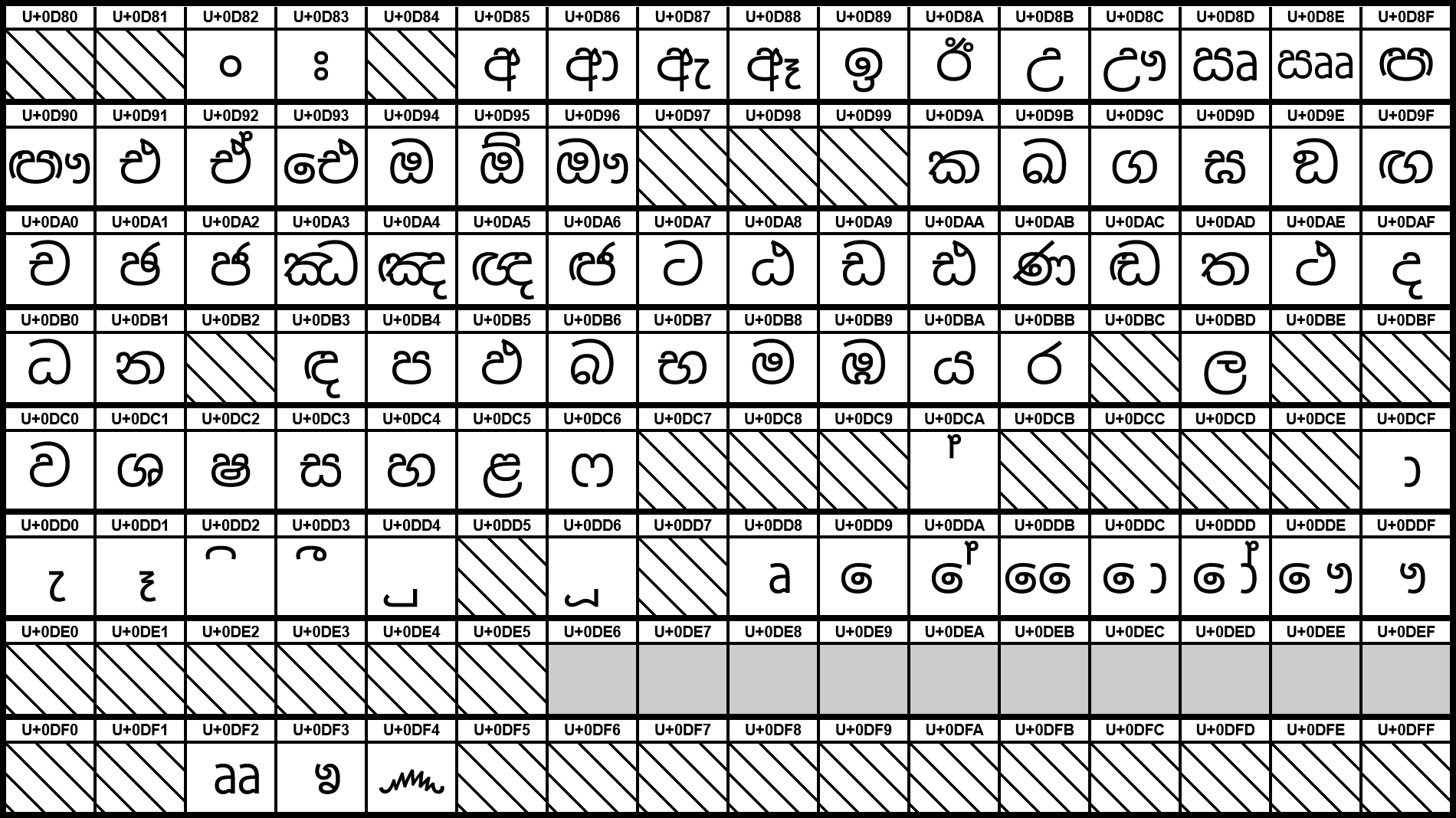 Grafiktafel für den Unicodeblock Singhalesisch. Schraffierte Felder sind unbesetzte Codepoints.